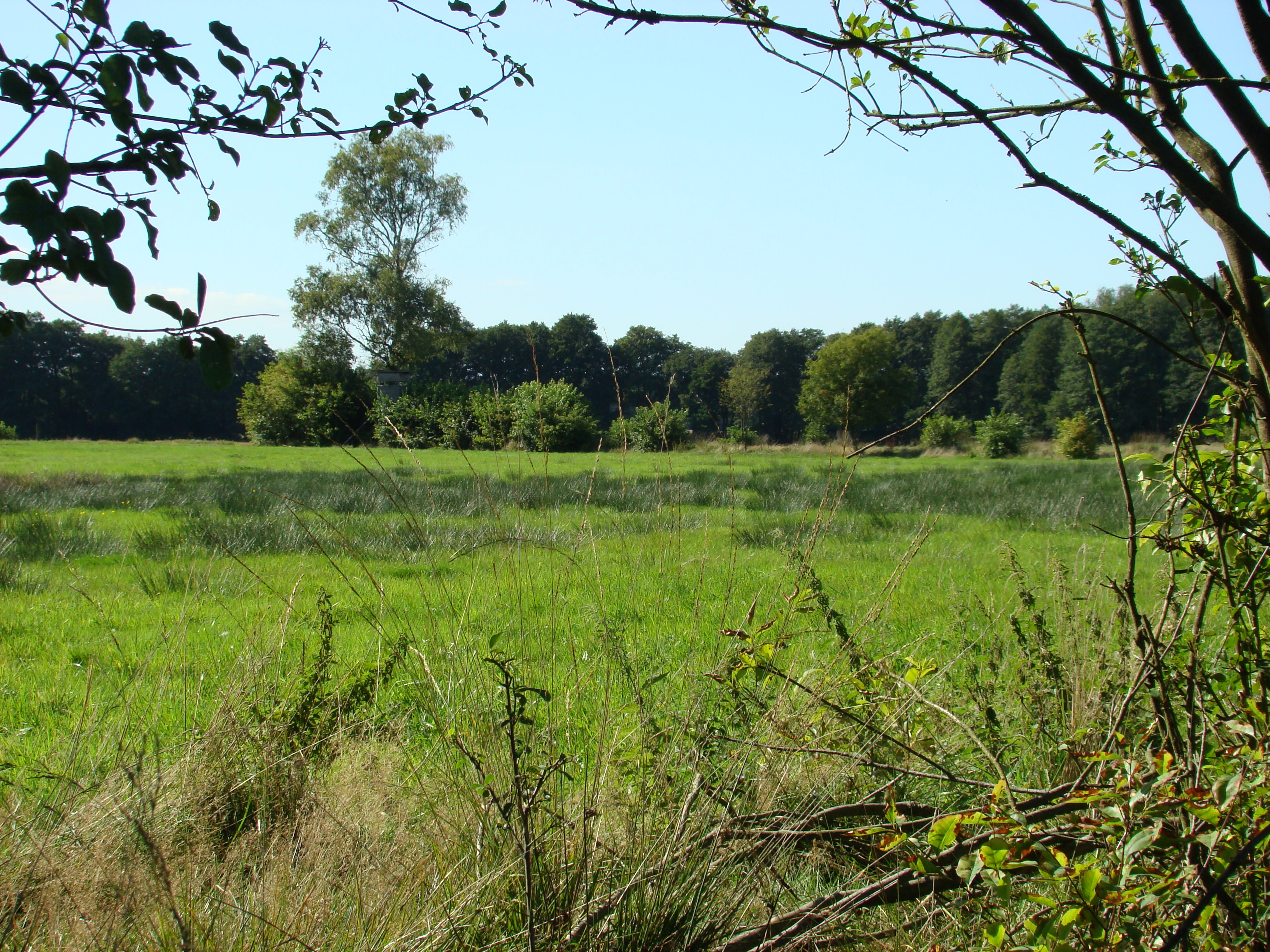 Feuchtwiese im Kiehnmoor Wet meadow in the Kiehnmoor, Lower Saxony, Germany.